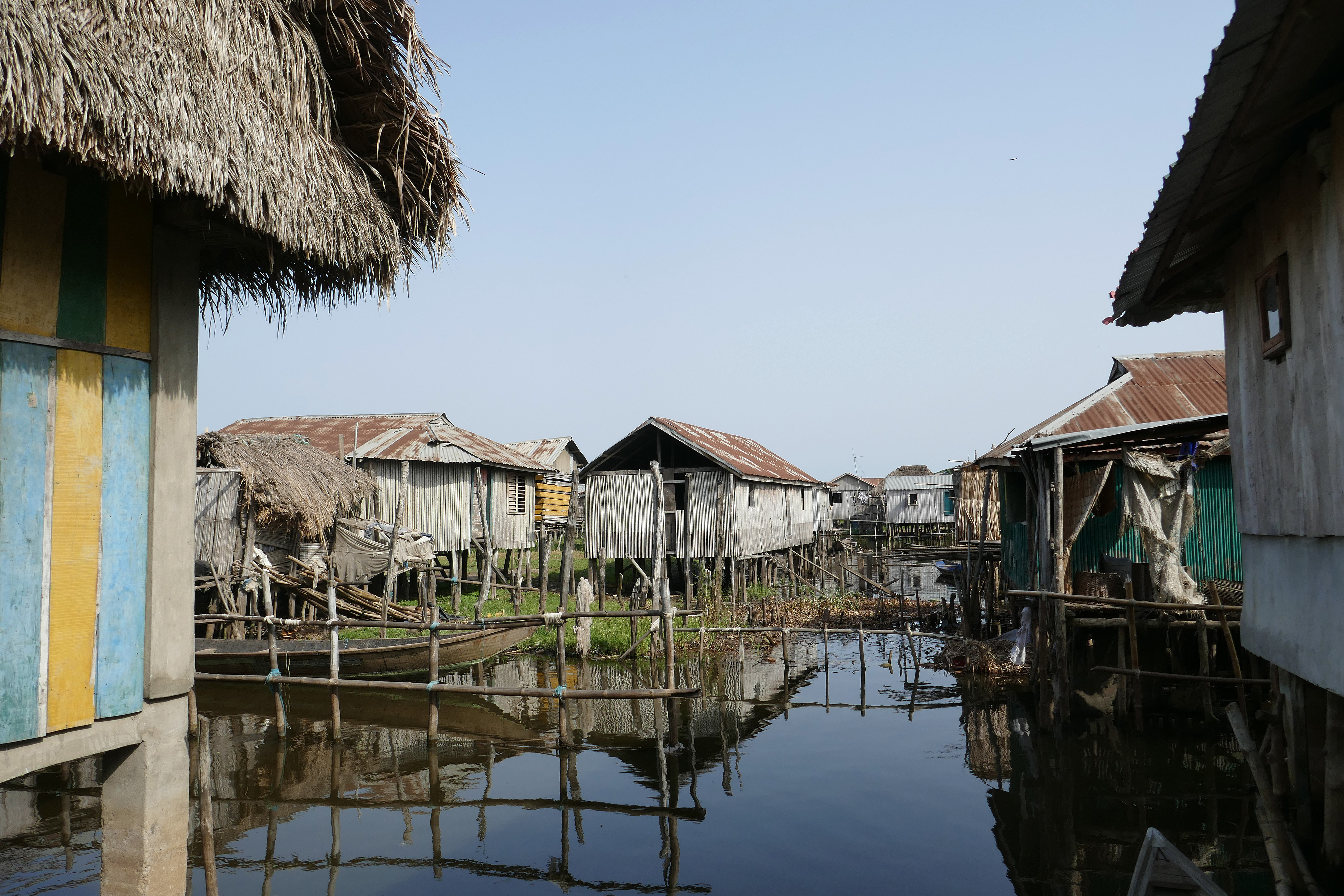 Ganvié (Bénin) : maisons en toit de chaume ou de tôle.